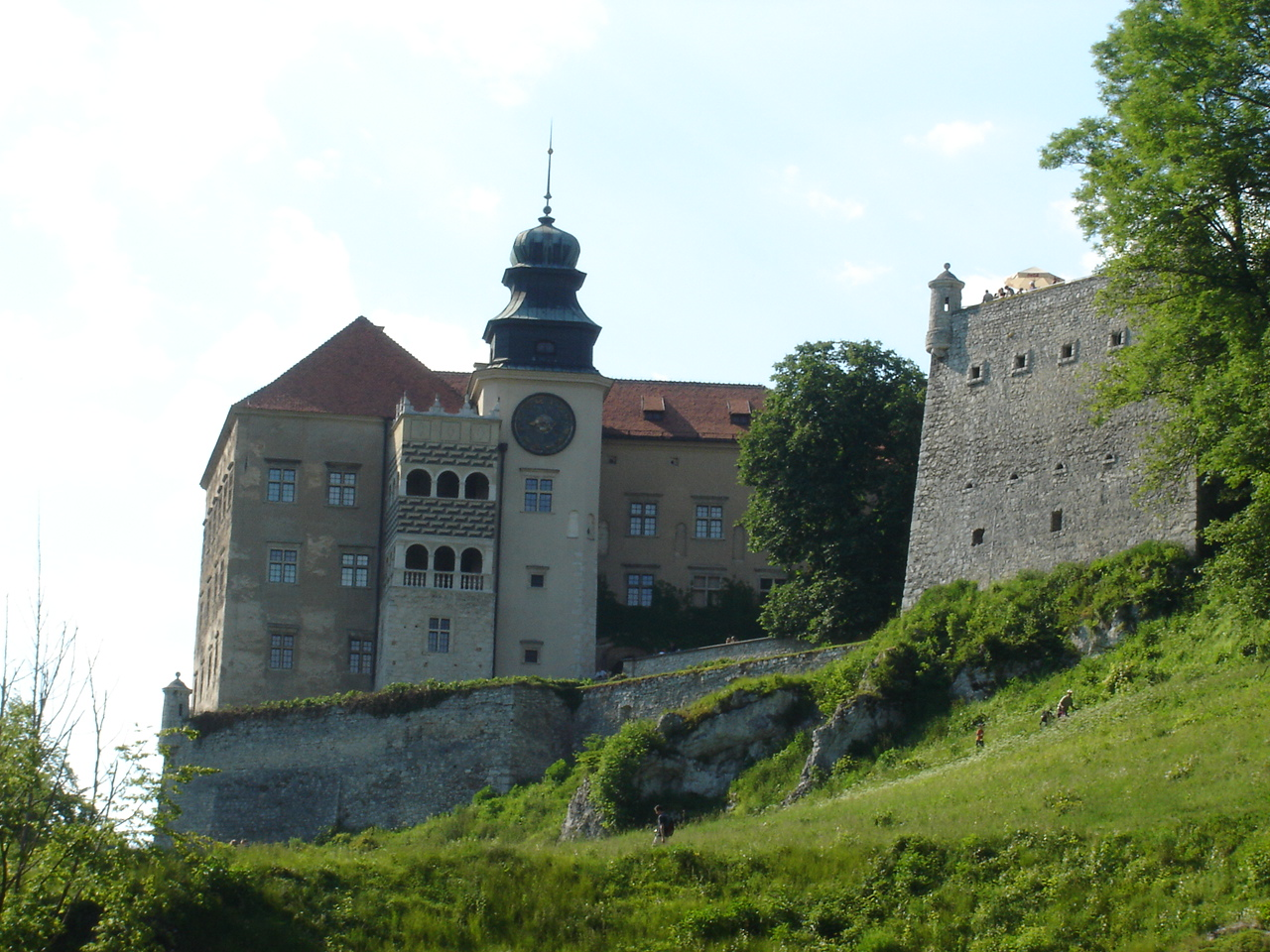 Opis: Zamek Pieskowa Skała, Małopolska Autor: user:kirq Data: 15.06.2006